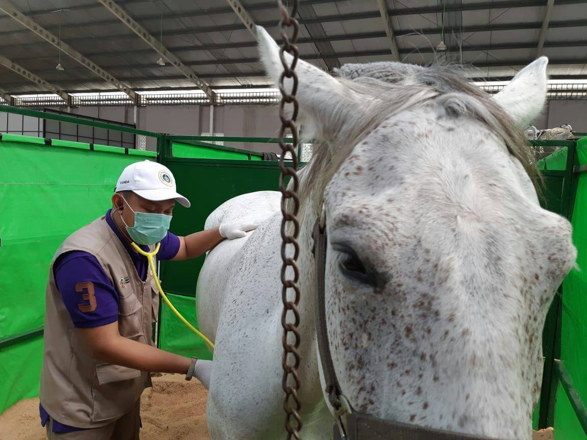 Pejabat karantina hewan yang bertugas di Badan Karantina Pertanian sedang memeriksa kuda impor dalam rangka Asian Games 2018